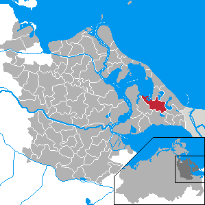 Benz, Landkreis Ostvorpommern, Mecklenburg-Vorpommern